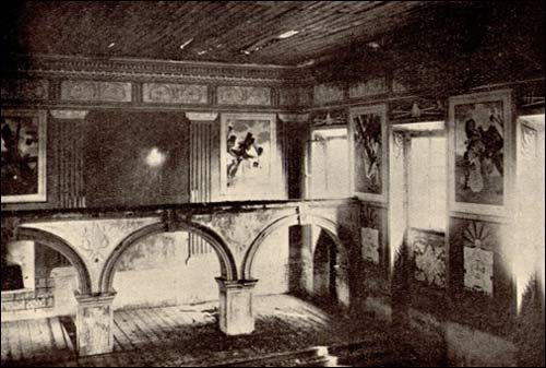 Інтэр'ер Ільінскай капліцы ў Глыбокім на здымку 1929 г.